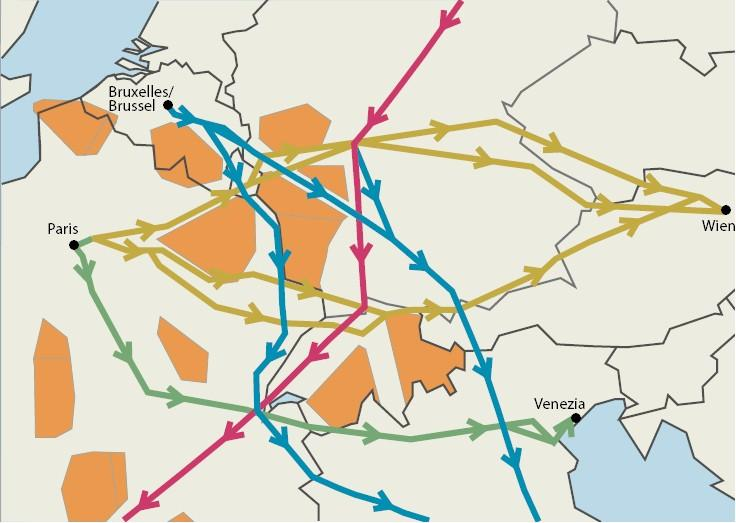 Bron Eurocontrol door Ben Pirard